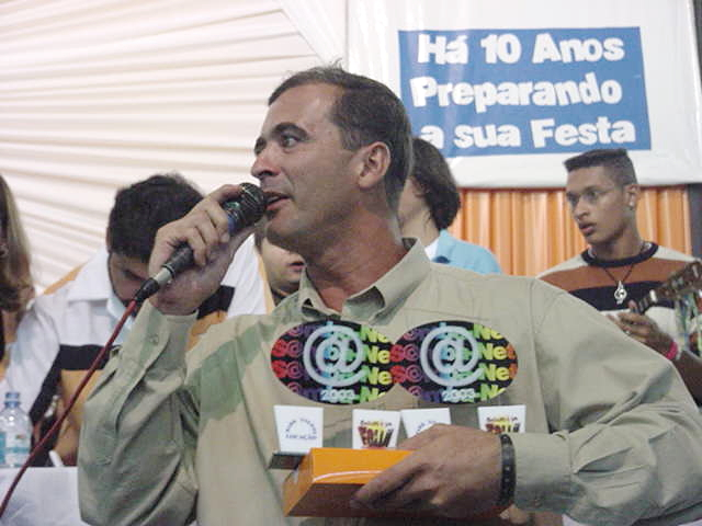 Foto: Mauro Samagaio